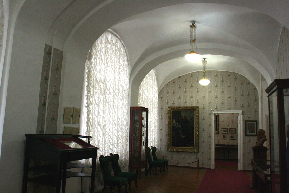 Salon de l'appartement-musée de Mendeleïev à Saint-Peterssbourg